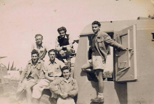 חיילים לפני יציאת שיירת יחיעם